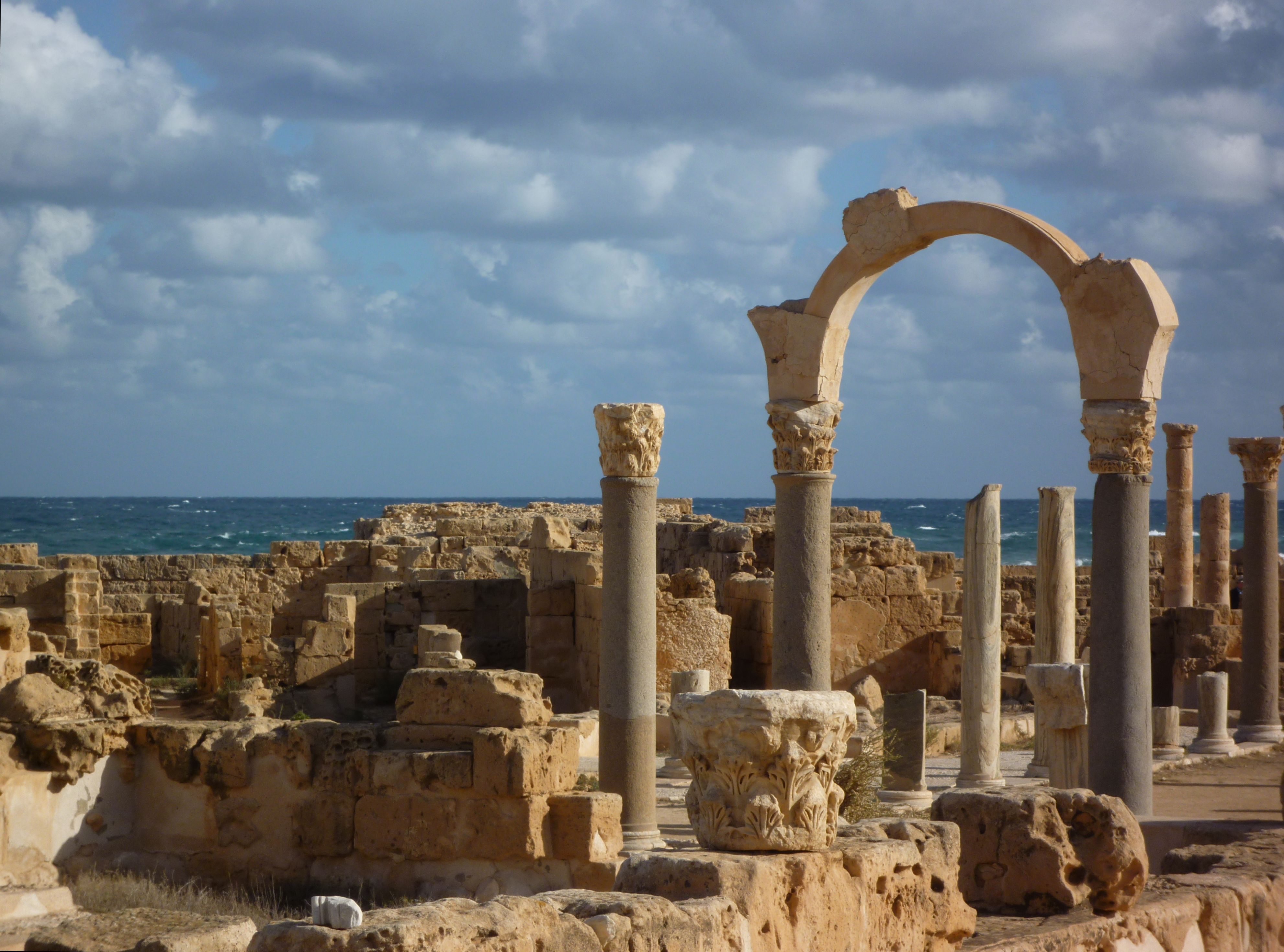 Sabratha - Forumsgelände